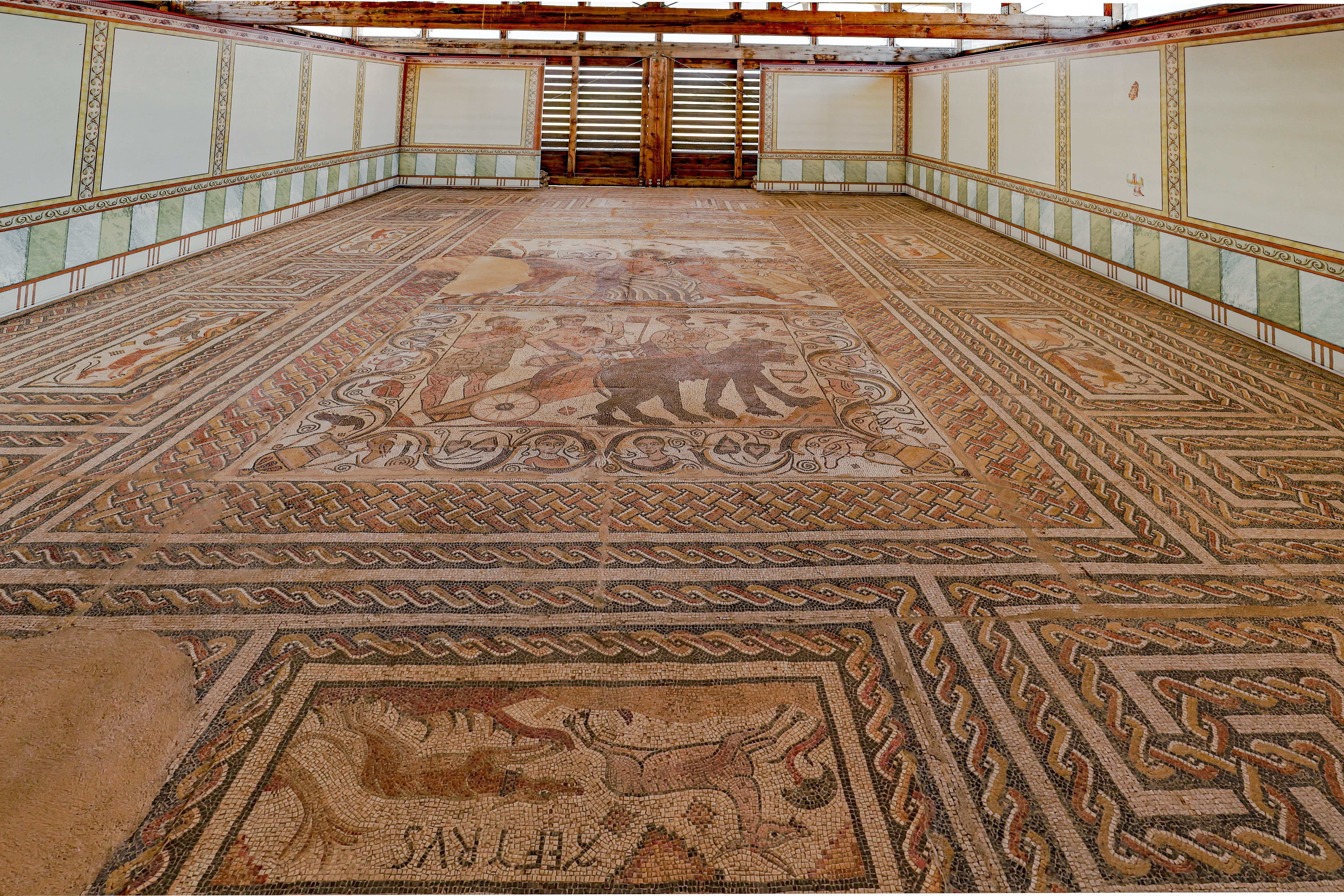 Baños de Valdearados es un municipio de la comarca Ribera de Duero, en la provincia de Burgos.